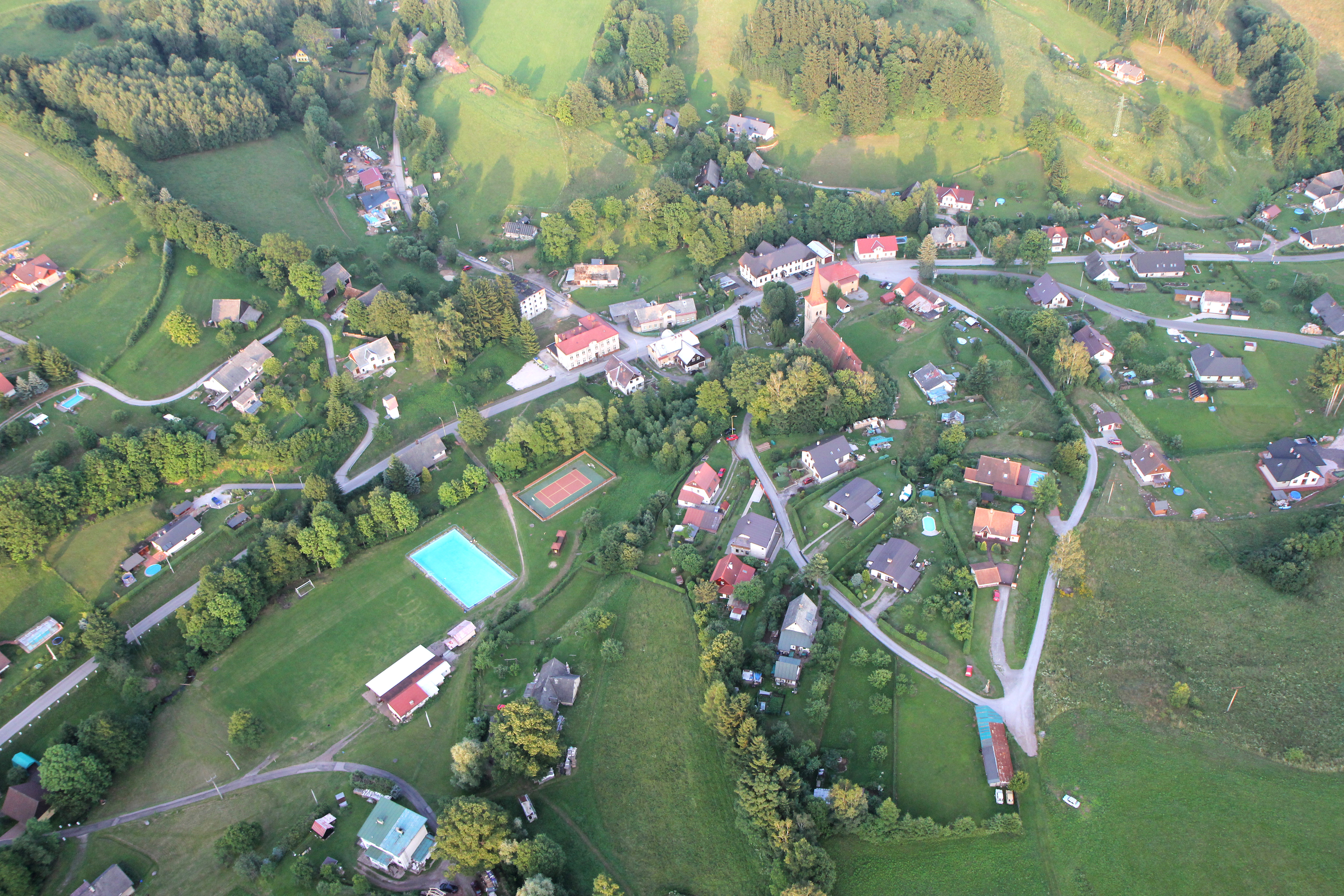 letecký snímek